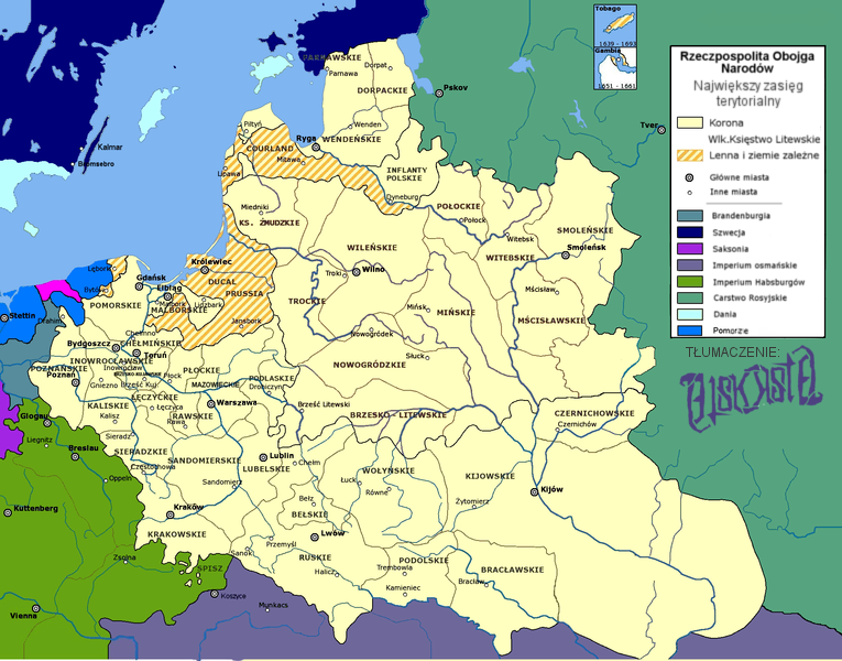 Unia polsko - litewska w 1625